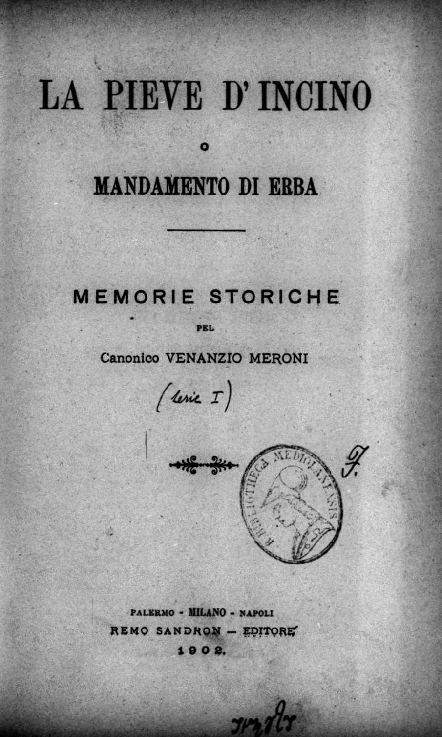 Frontespizio